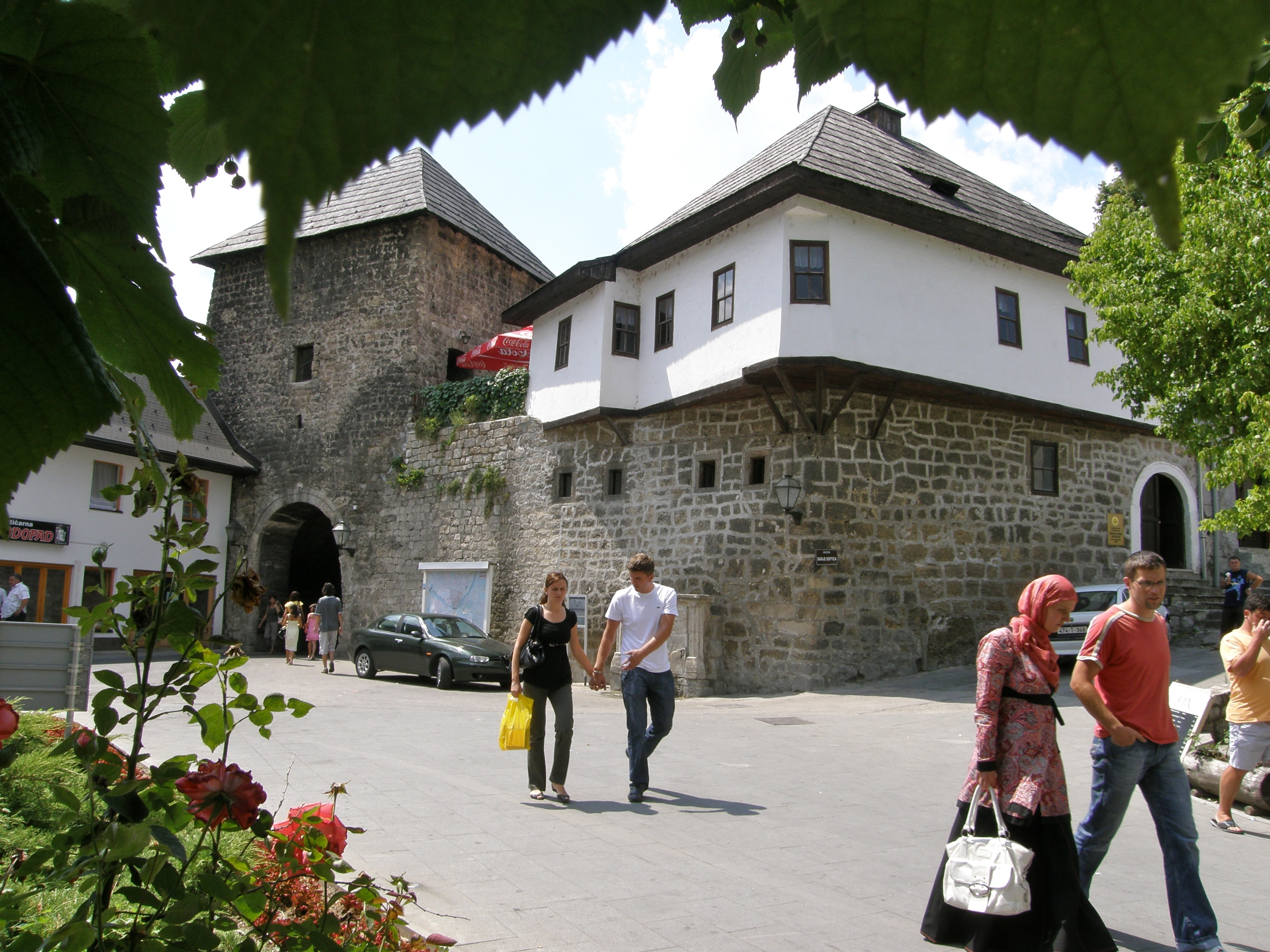 Jajce